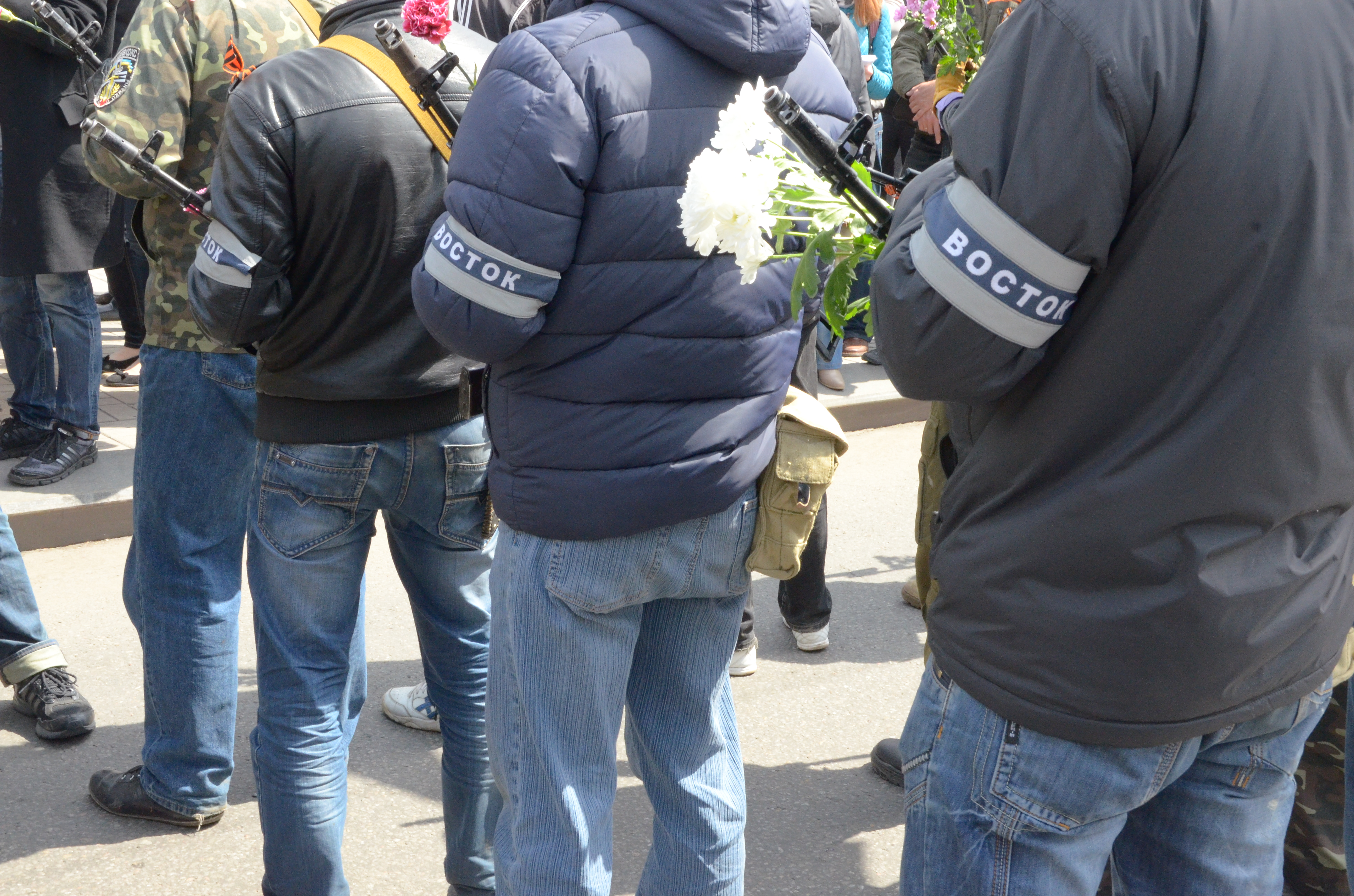 День Победы в Донецке